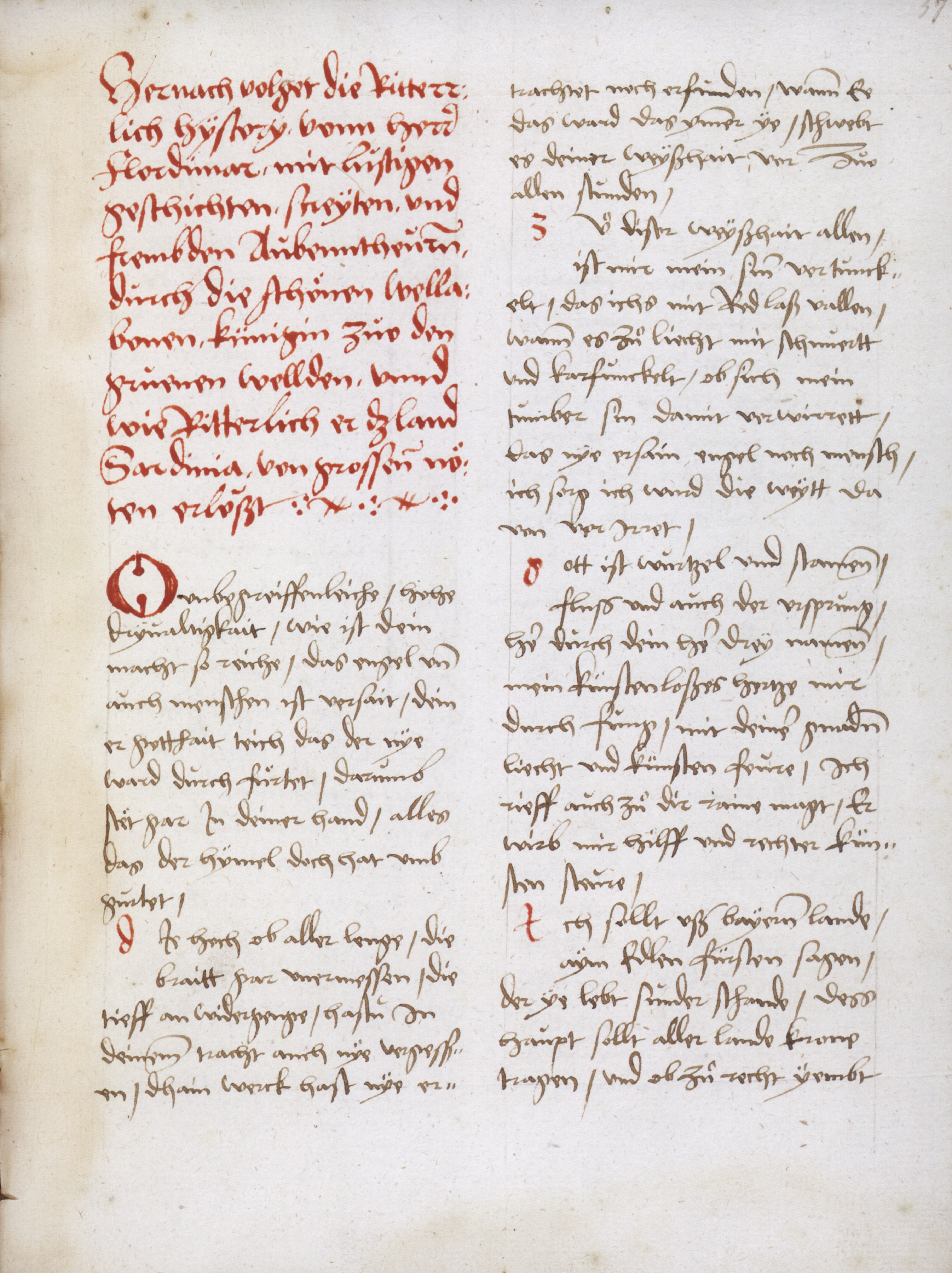 Ulrich Füetrer: Historie vom ritter Poytislier und History vom Herr Flordimar. Badische Landesbibliothek Karlsruhe, Codex Donaueschingen Cod.. Don. 140, hier: fol. 37v, Beginn der History vom Herr Flordimar Handschrift nachgewiesen im Bibliothekskatalog Meßkirch 1730/1740, möglicherweise unter Gottfried Werner von Zimmern in die Bibliothek gelangt